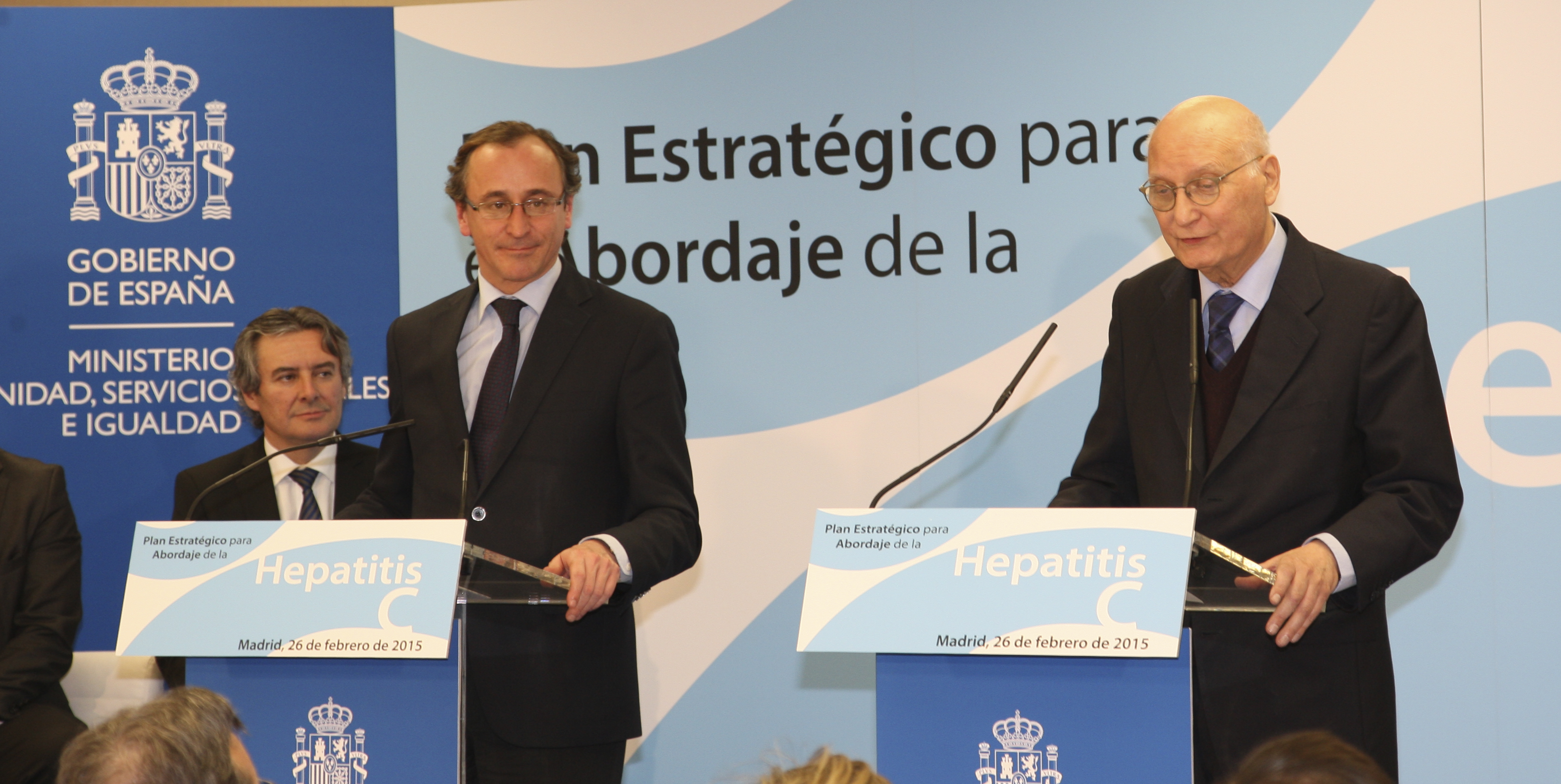 Presentación del Plan Estratégico para el Abordaje de la Hepatitis C en España